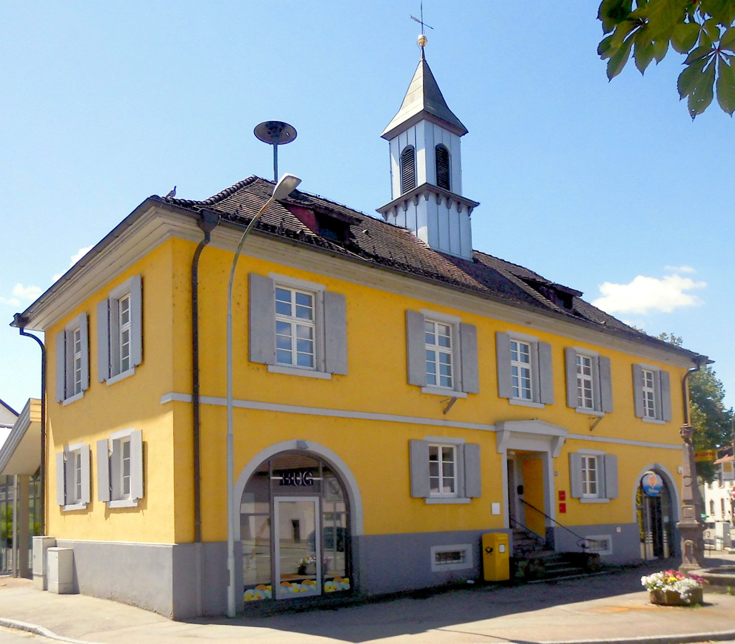 Postgebäude in Maulburg, Baden-Württemberg